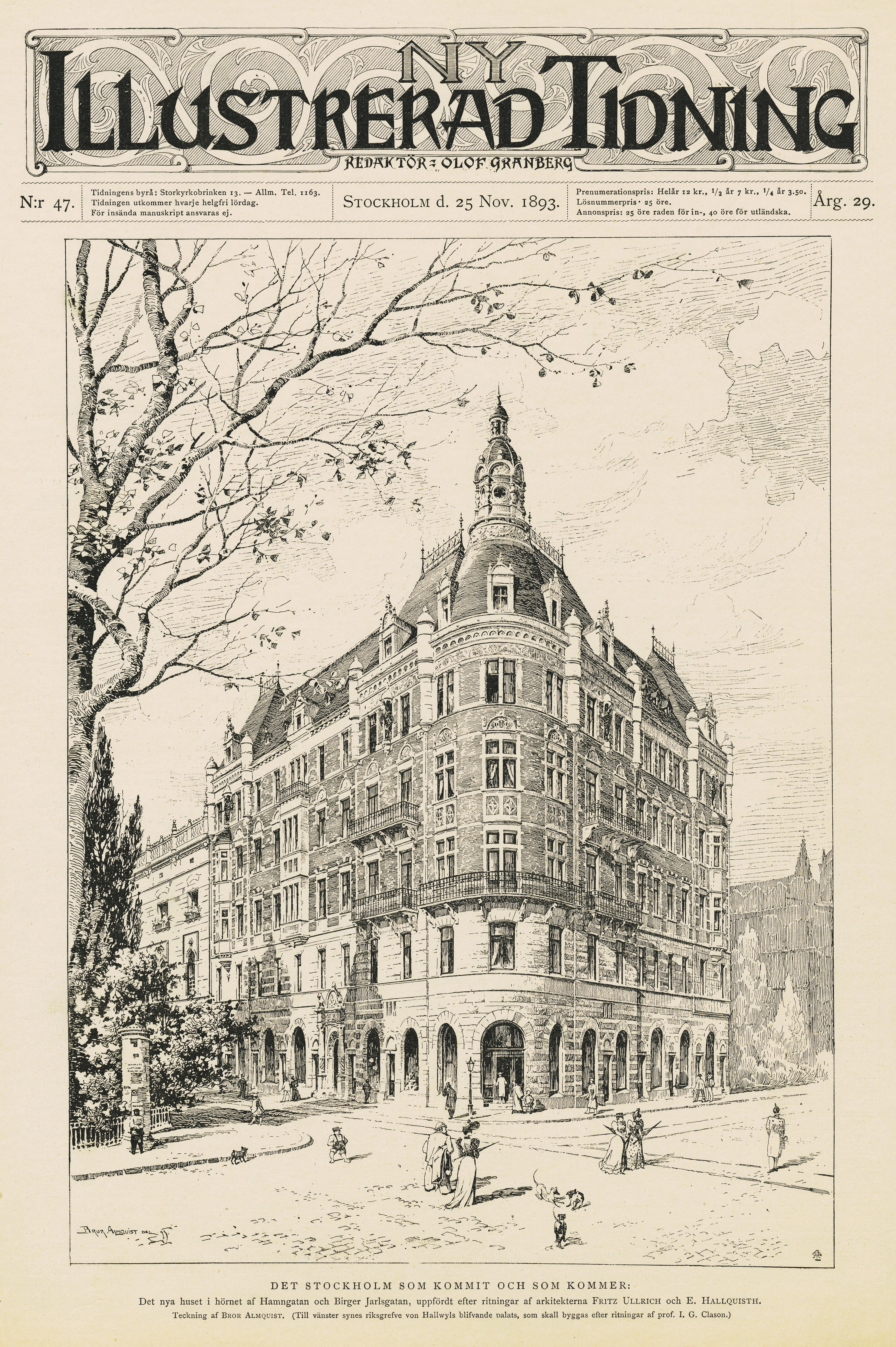 Fastigheten Skravelberget Mindre 12